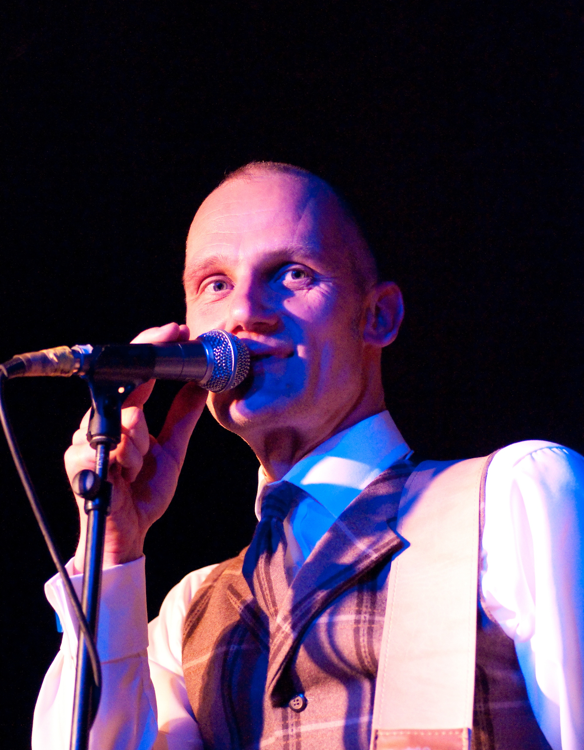 Brixtonboogie (Krisz Kreuzer) live im Quasimodo in Berlin am 30.04.2010